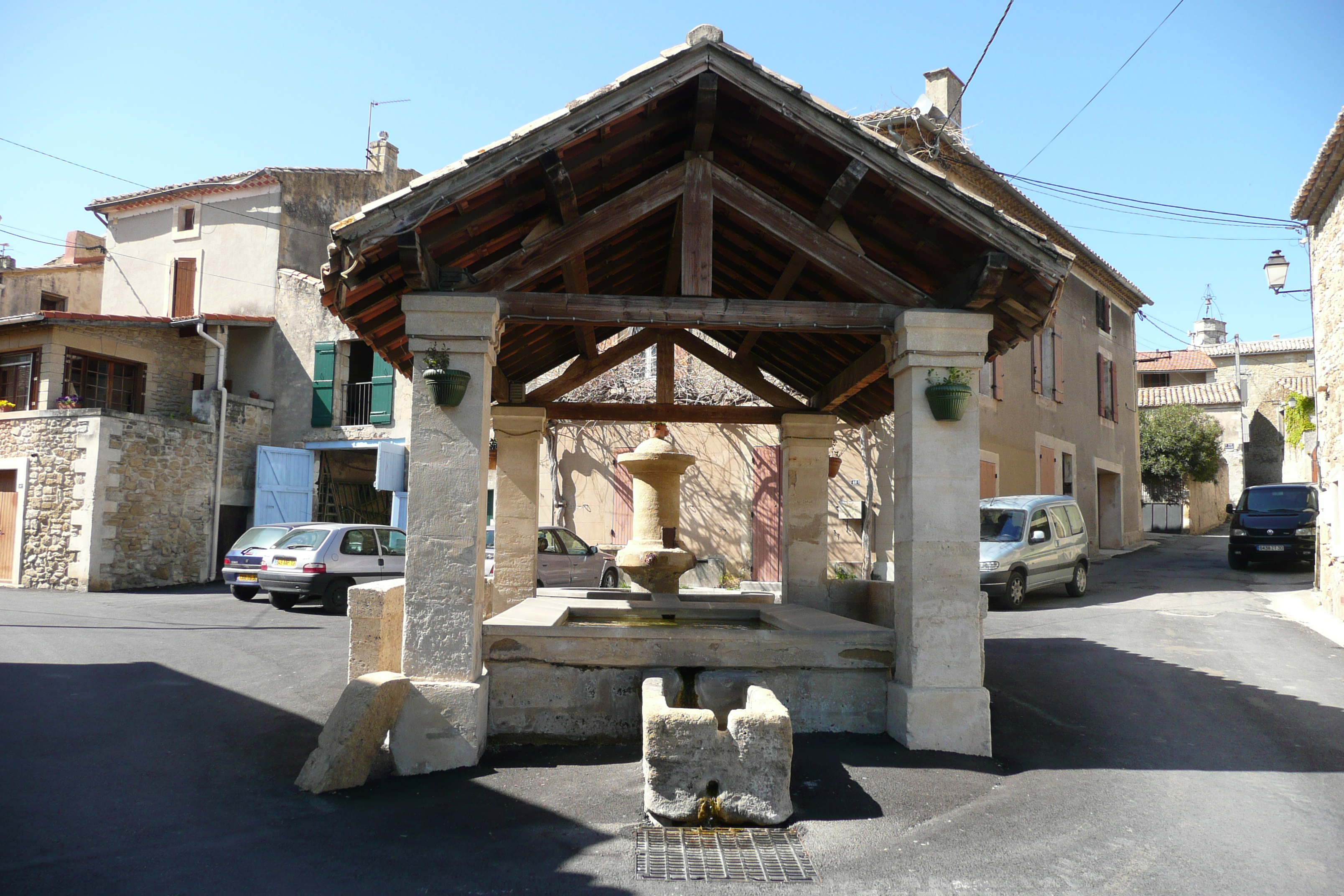 Lavoir à Pujaut